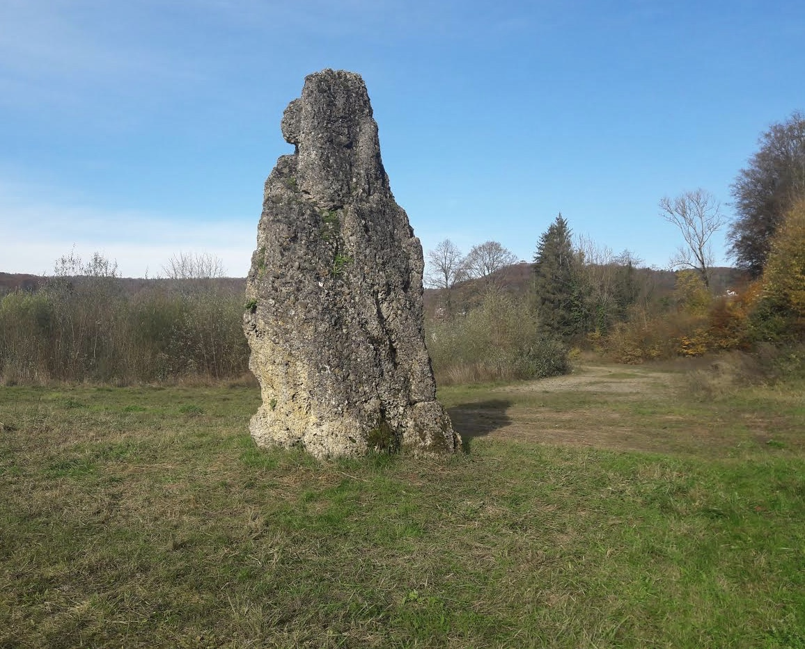 Menhir Langenstein in Tiengen, Landkreis Waldshut, Baden-Württemberg, Deutschland